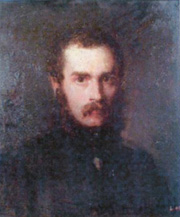 Self-portrait